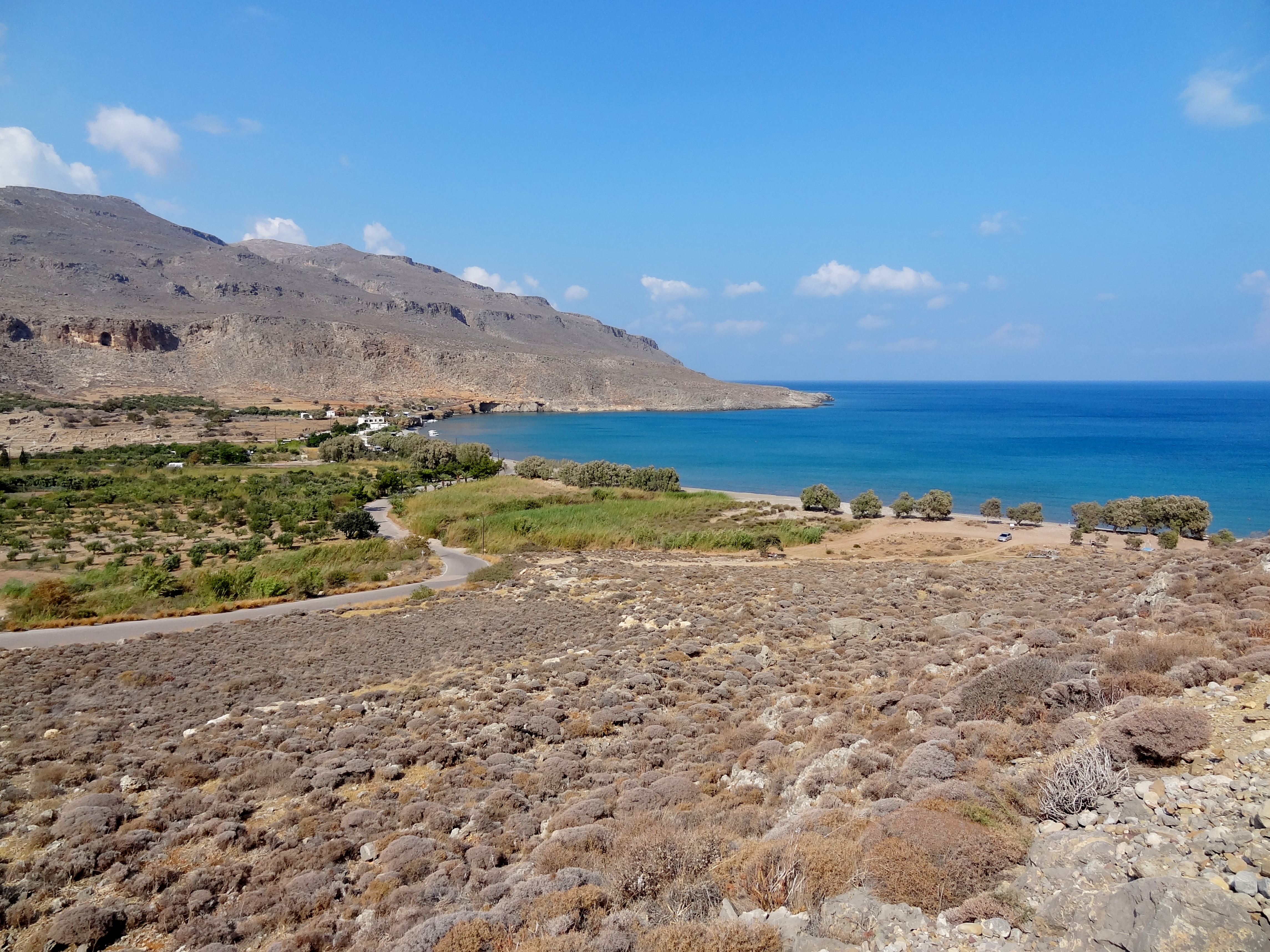 Kato Zakros (Κάτω Ζάκρος), Gemeinde Sitia, Kreta, Griechenland